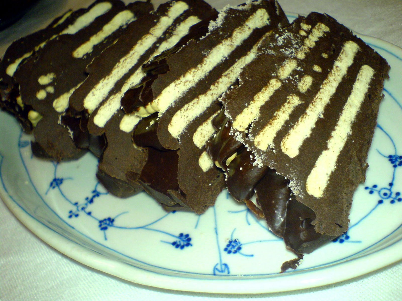 Kiksekage